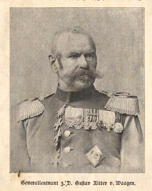 Gustav von Waagen (1832-1906), Bayerischer Adeliger und Generalmajor